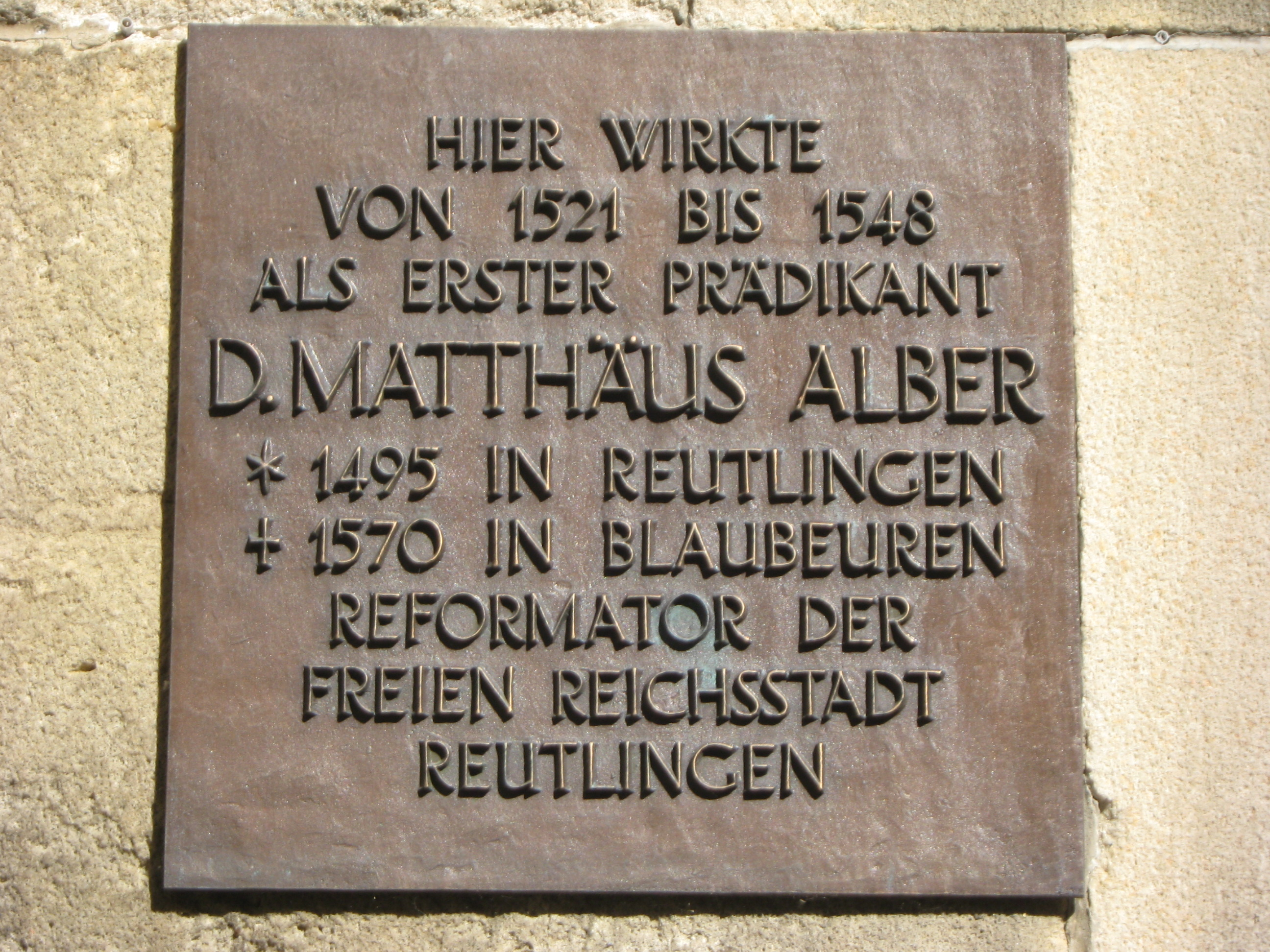 Das Nationale Kulturdenkmal Marienkirche in Reutlingen wurde zwischen 1247 und 1343 erbaut. Infotafel über das Wirken von Matthäus Alber.